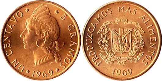 Moneda de un centavo de republica dominicana año 1969